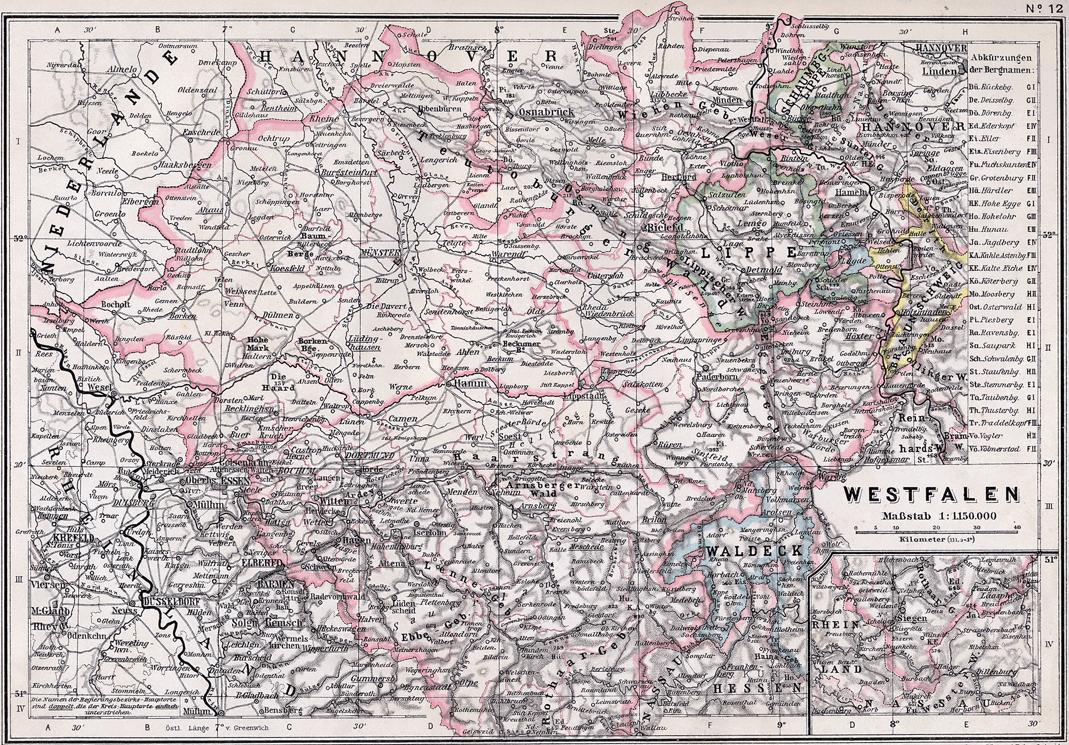 Historische Karte der Provinz Westfalen 1905